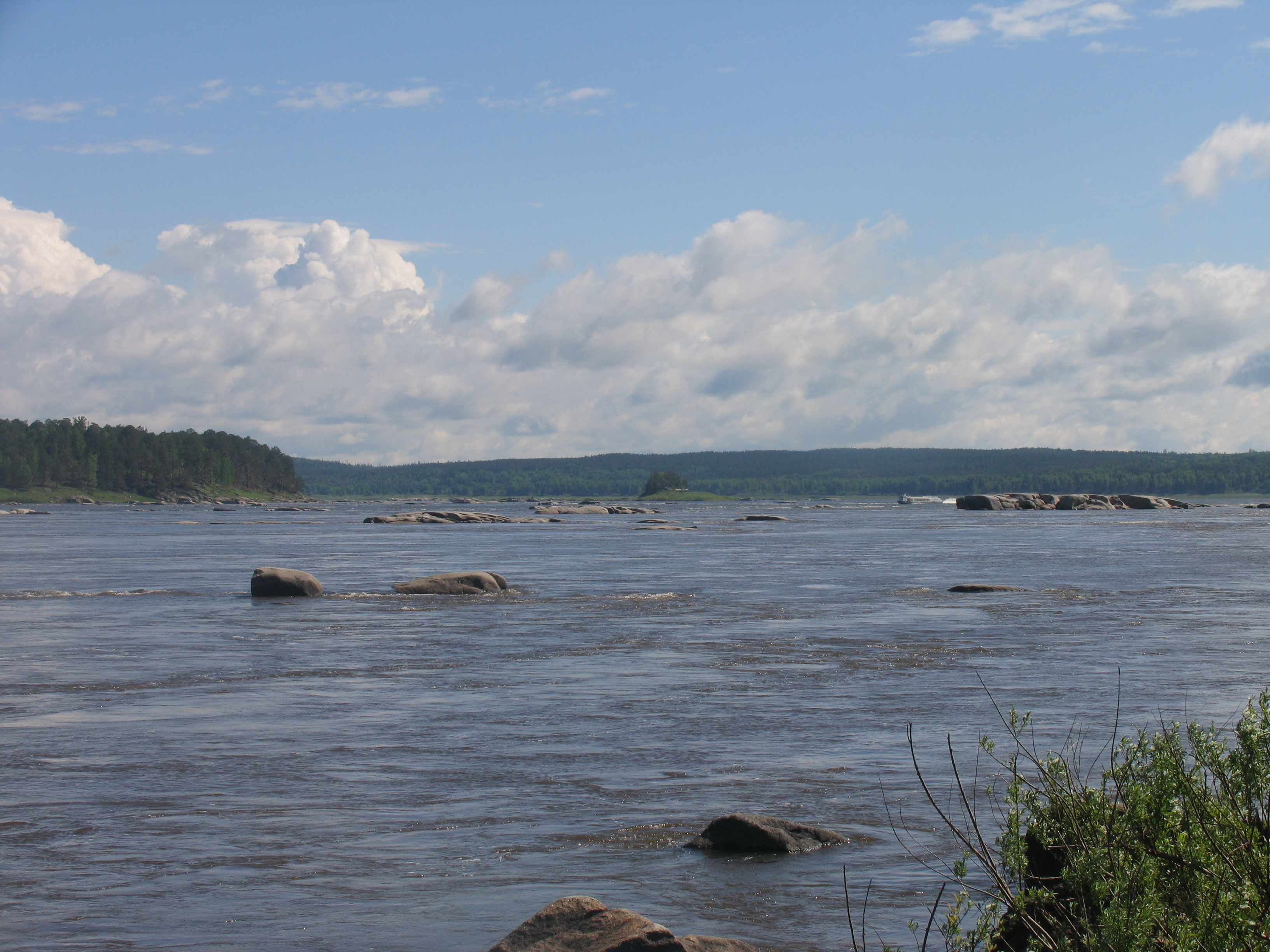 Пороги на Ангаре, в районе п.Стрелка, возле впадения в Енисей. Красноярский край.